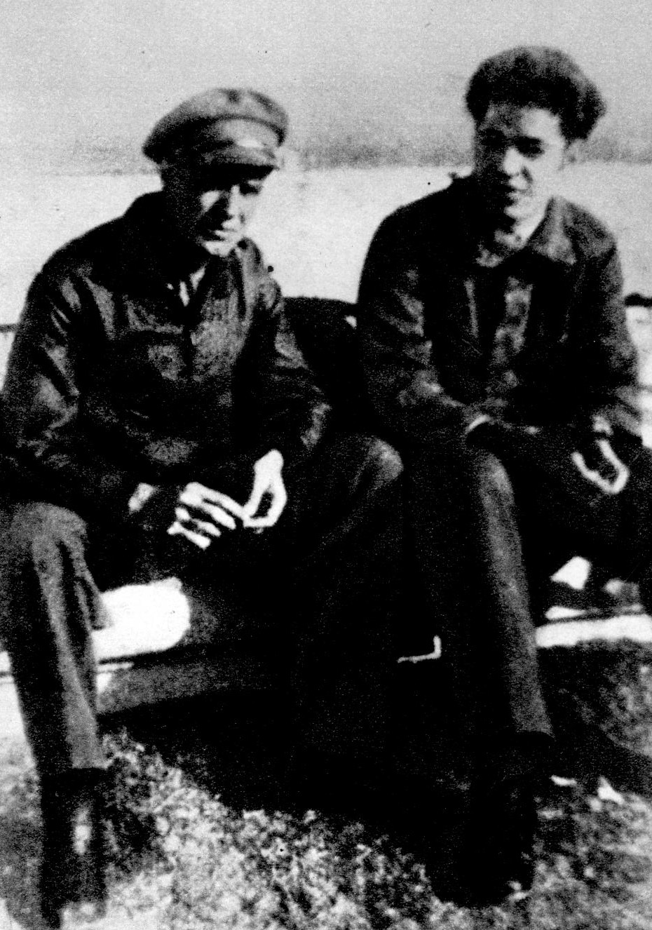 Veljko Vlahović i Branko Krsmanović u Almansi decembra 1937.